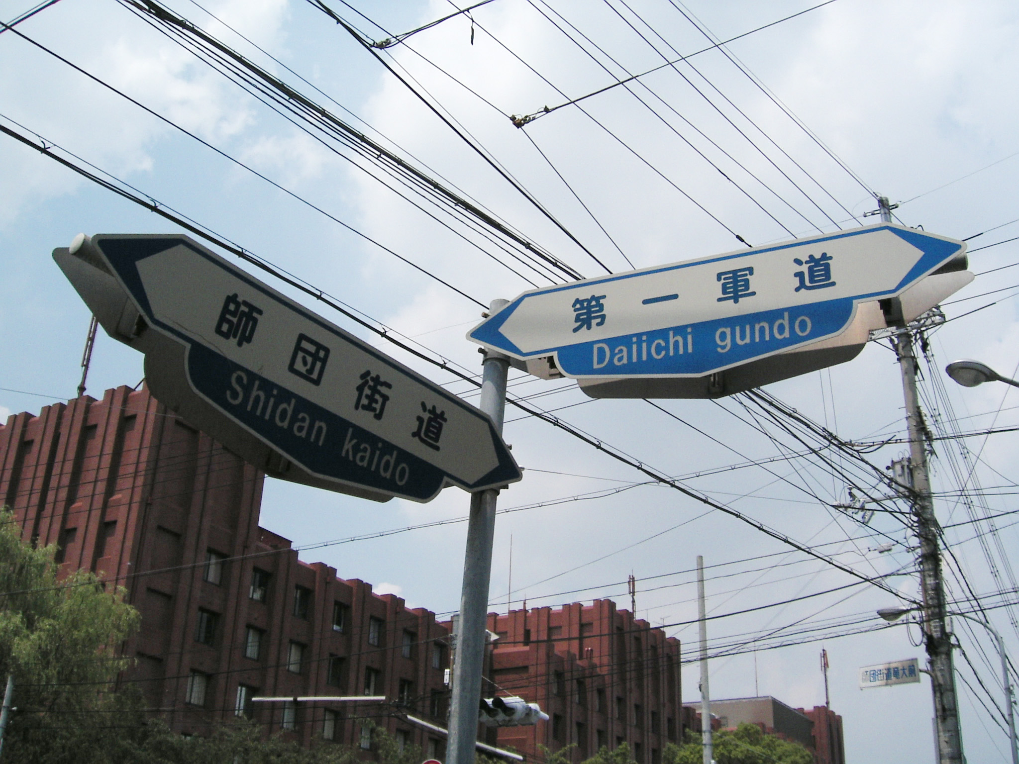 師団街道と第一軍道の交差